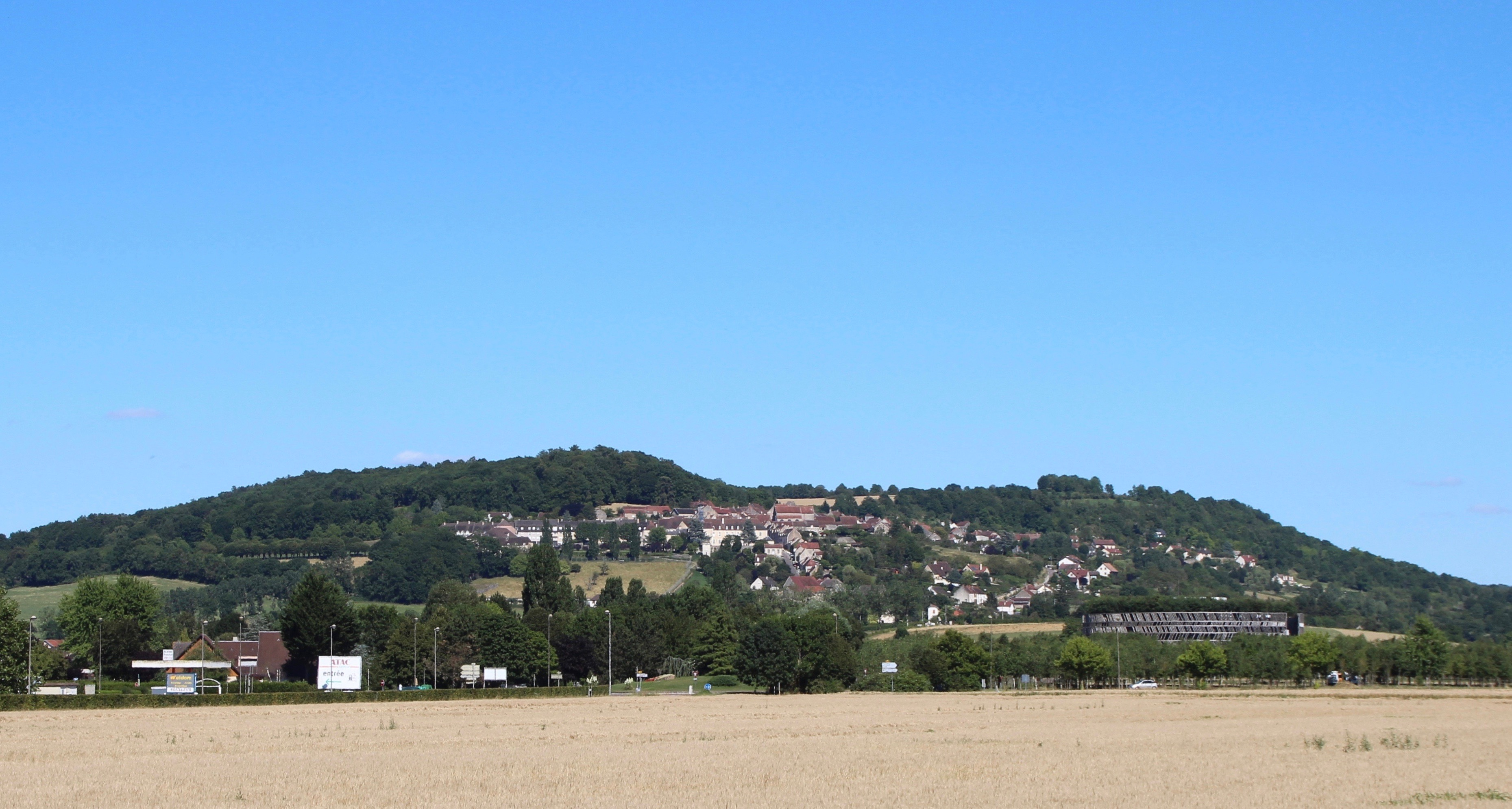 Alise-Sainte-Reine